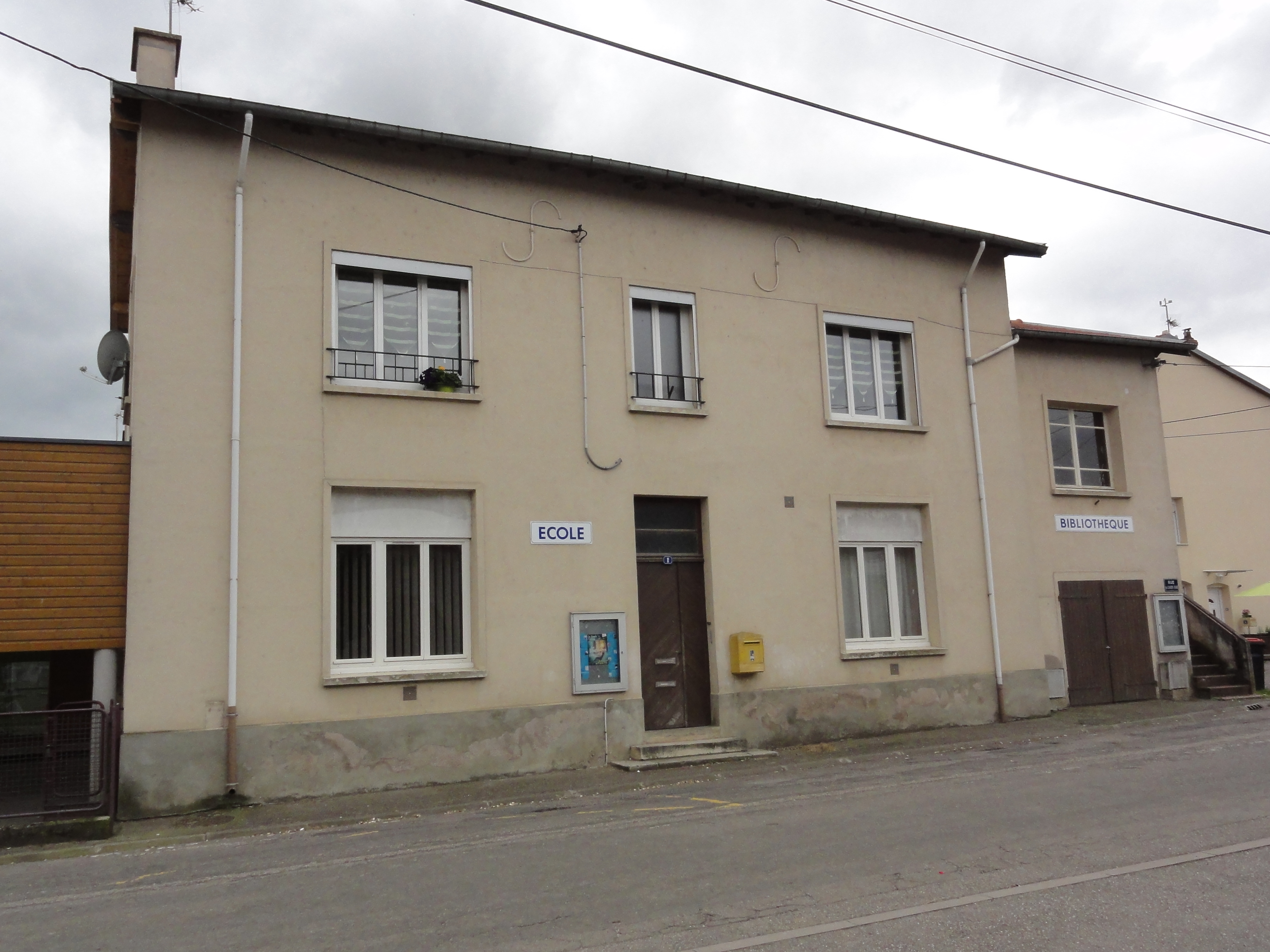 Vélaine-sous-Amance (M-et-M) école et bibliothèque